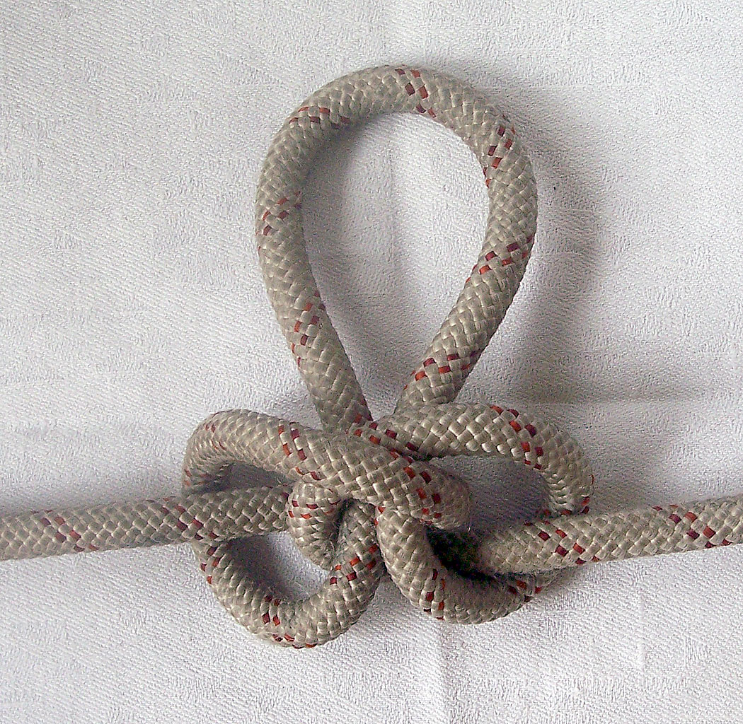 Alpine butterfly